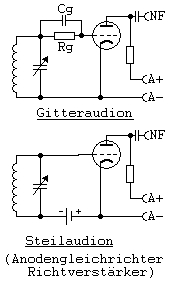 Audion